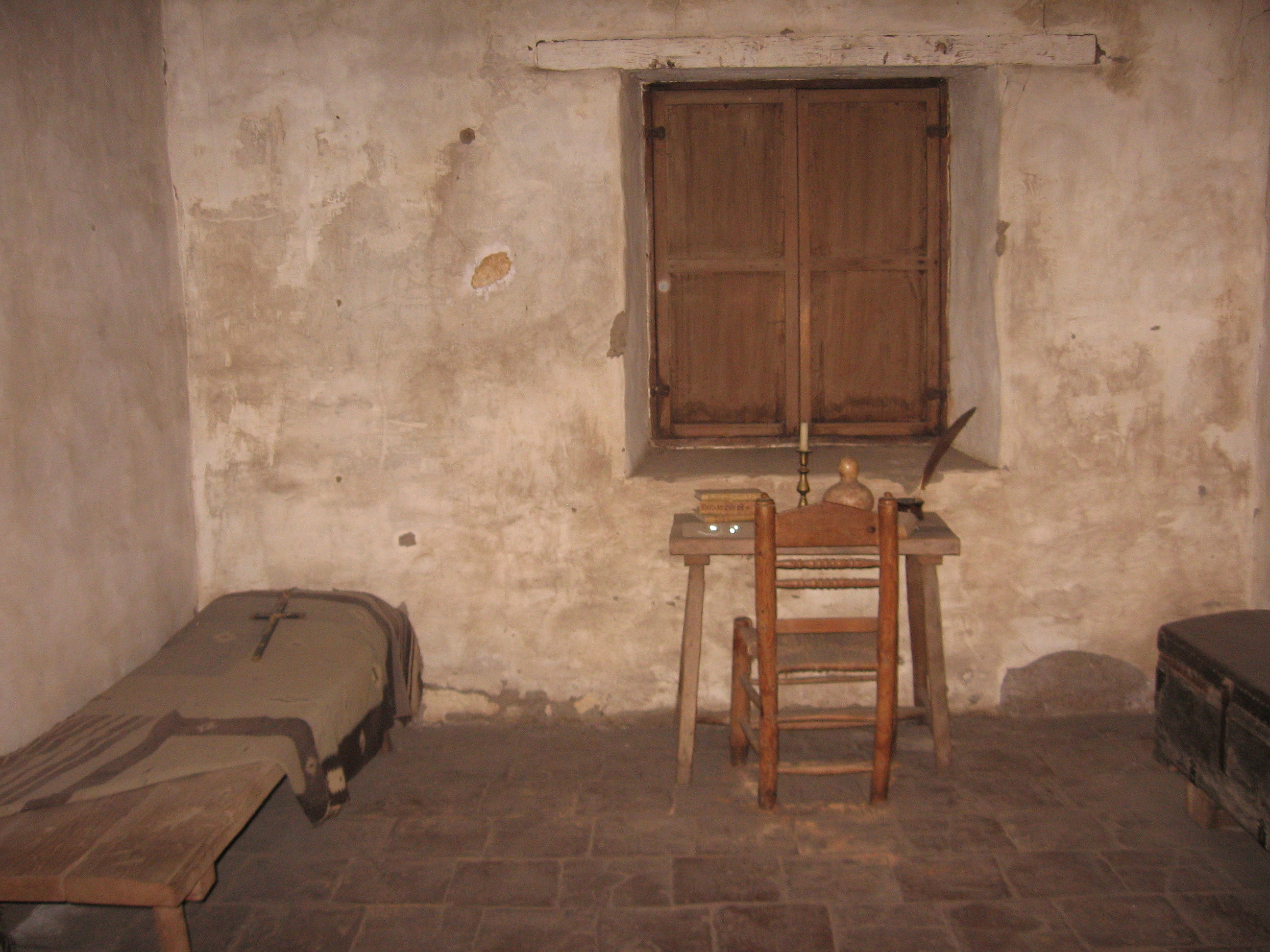 Padre's cell, Carmel Mission